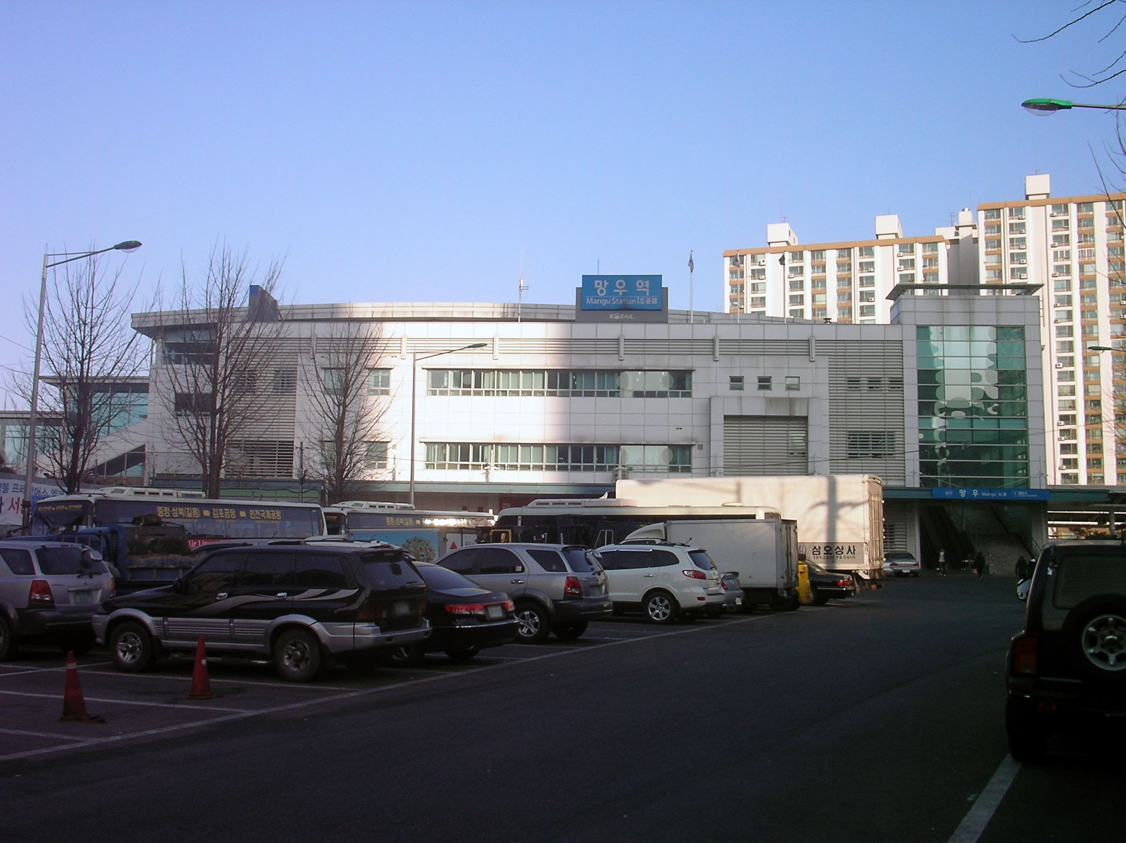 Mangu Station(en ja ko